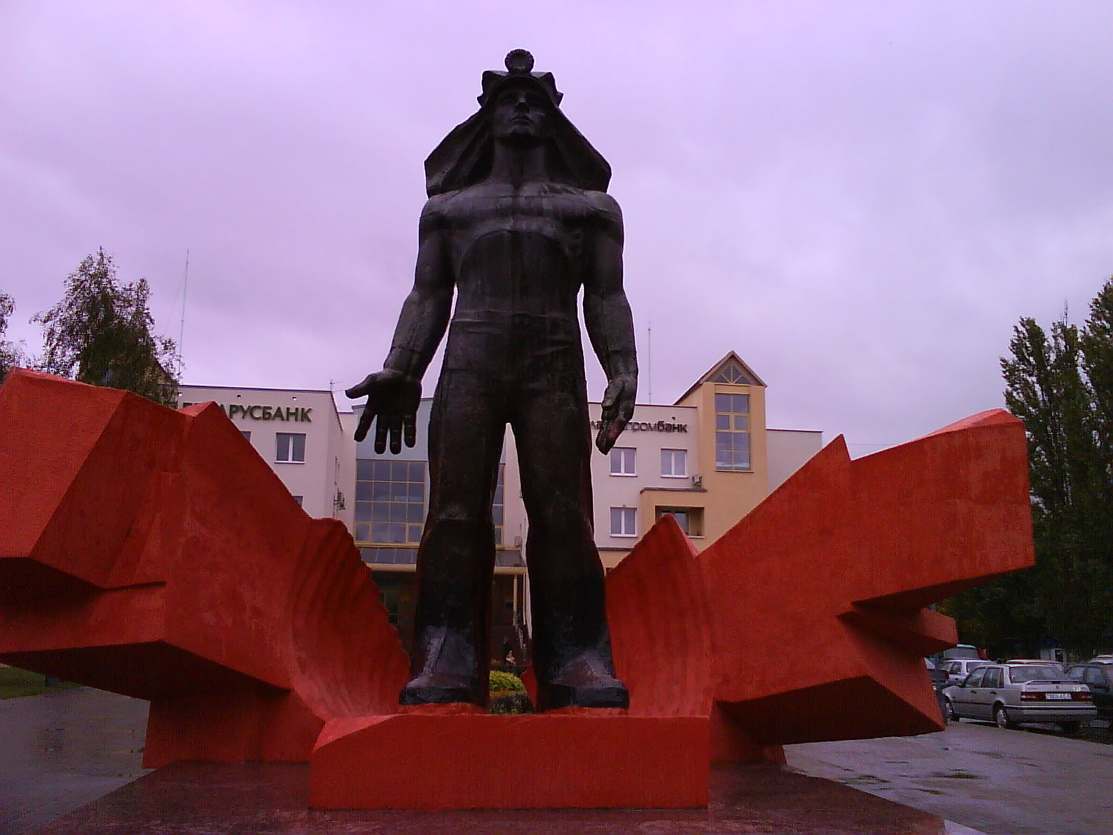 памятник шахтёру